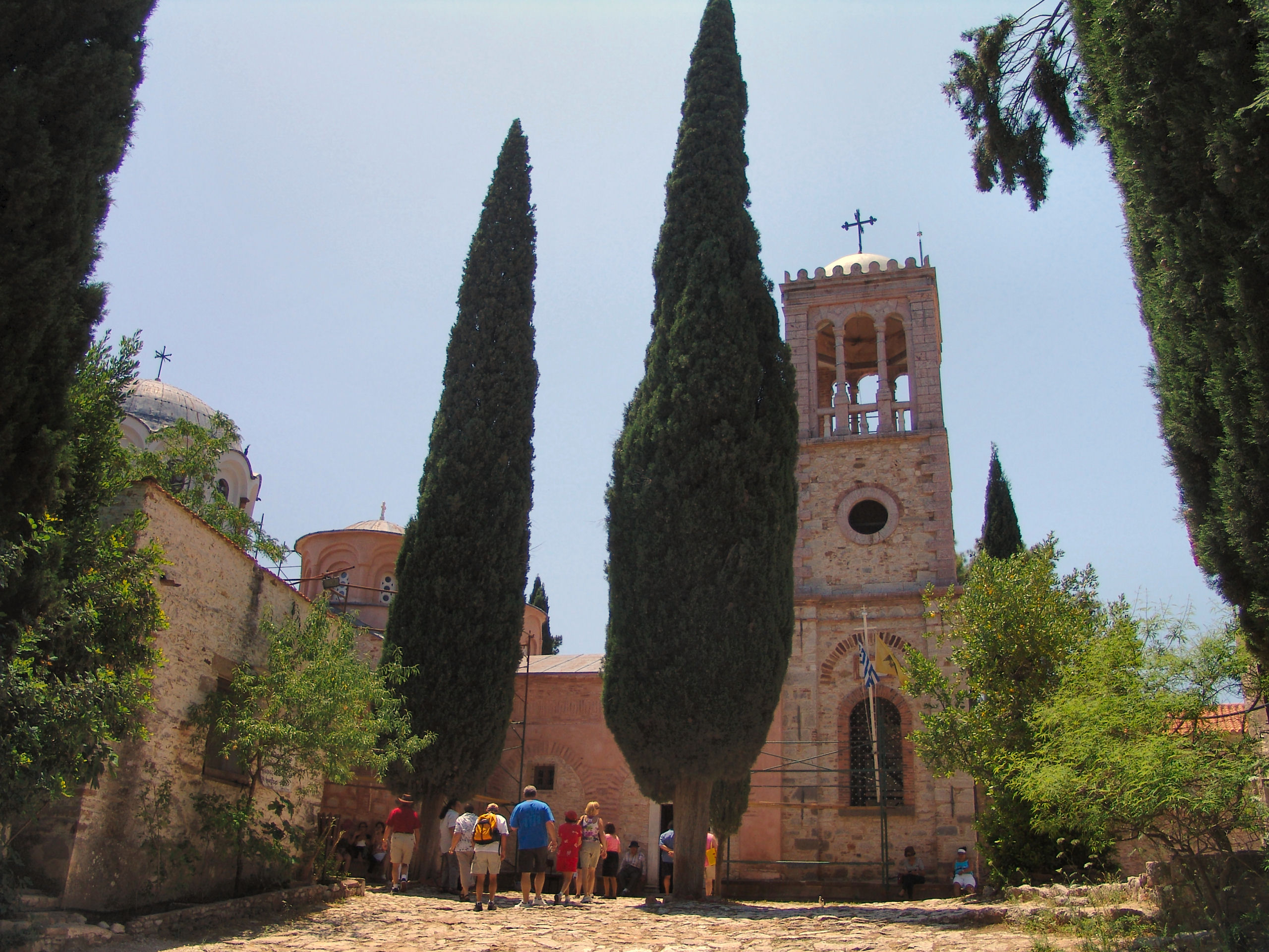 Nea Moni Monestary